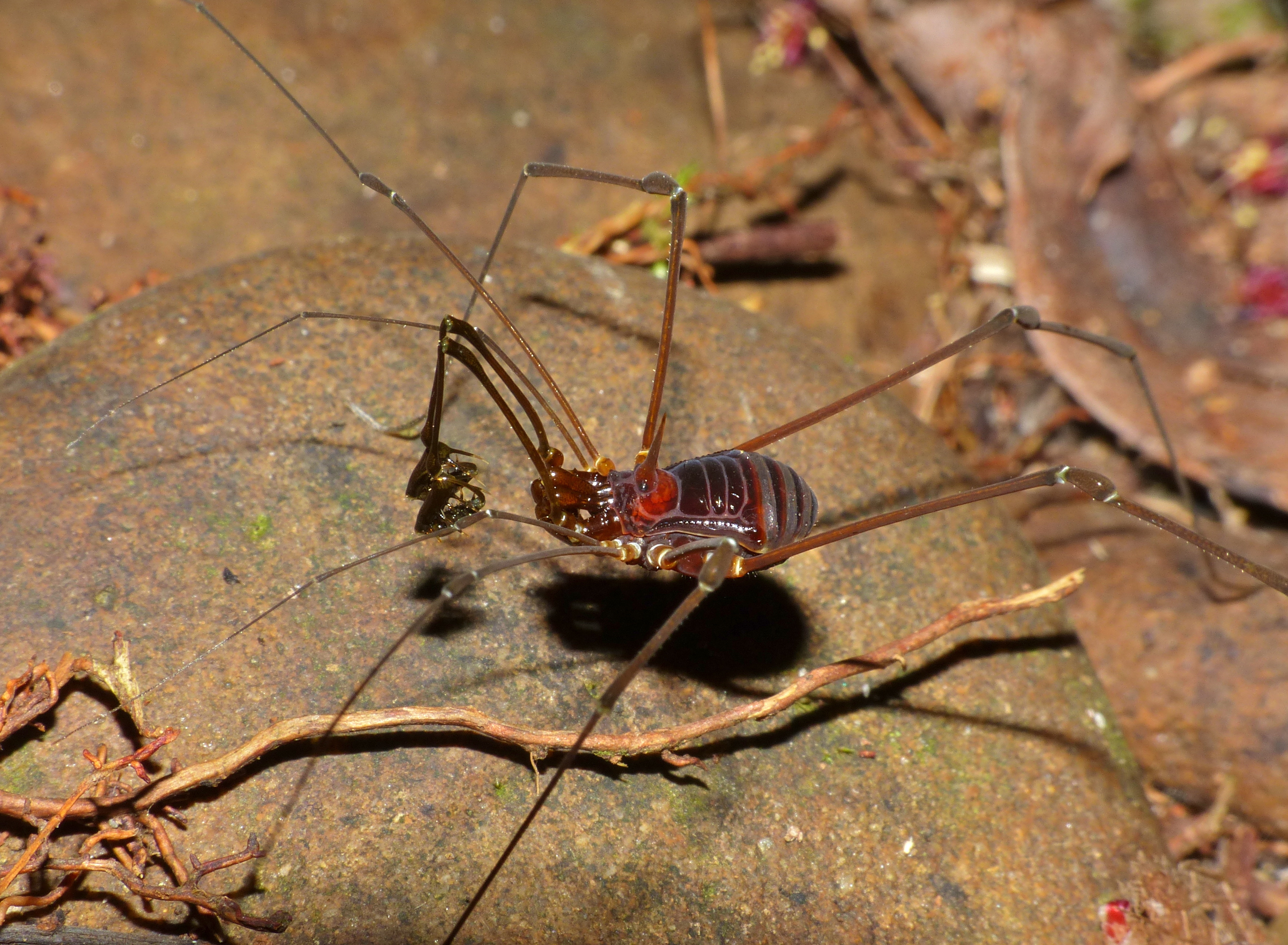 Night Walk Trail, Mulu NP, Sarawak, MALAYSIA